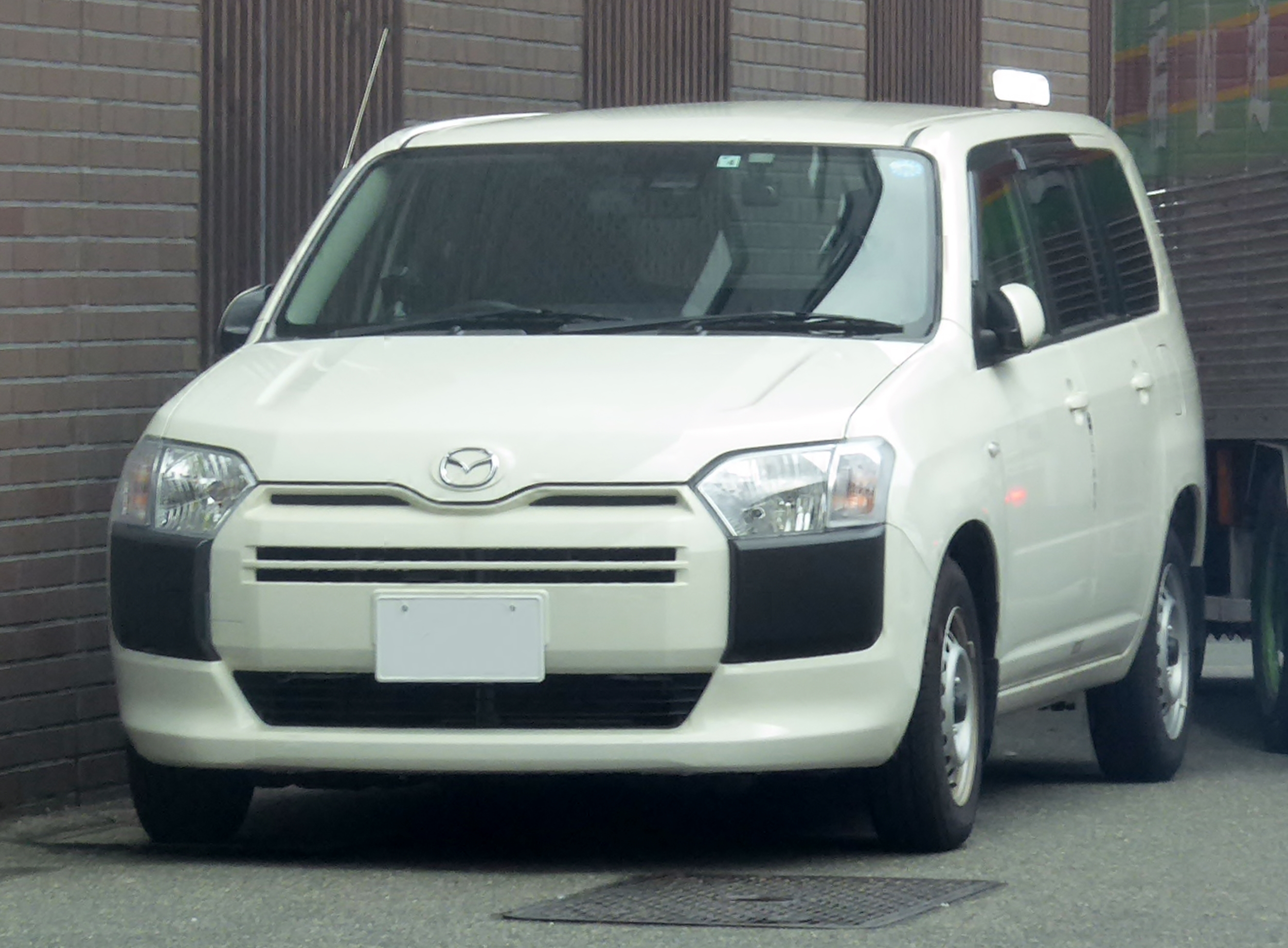 DBE-NCP160M型マツダ・ファミリアバンDXをフロントから撮影。